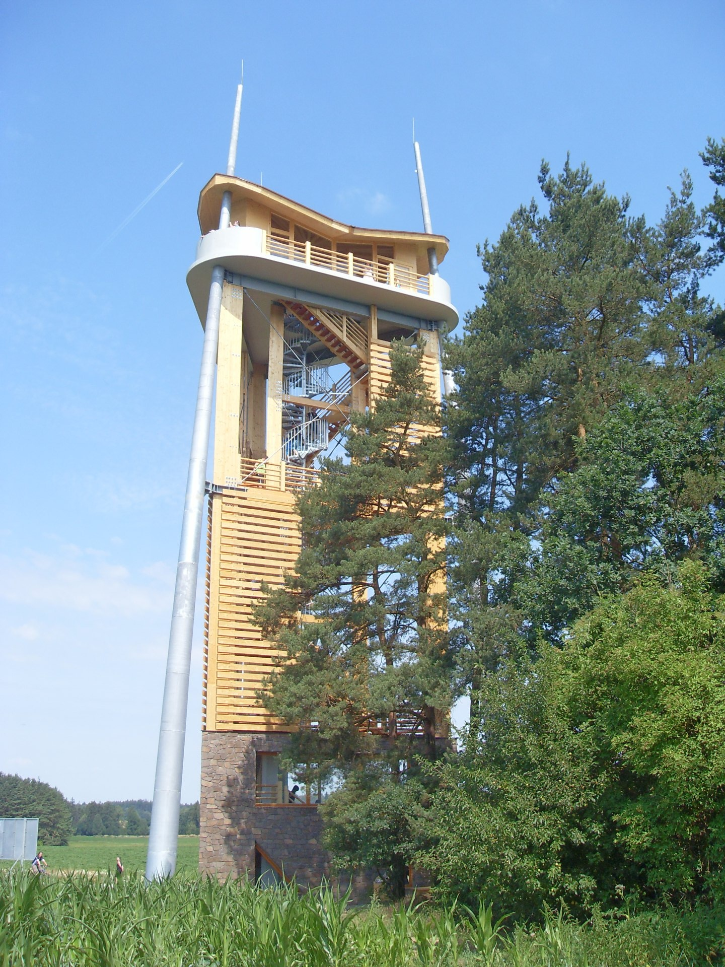 Název: Rozhledna Rýdův kopec u Děbolína